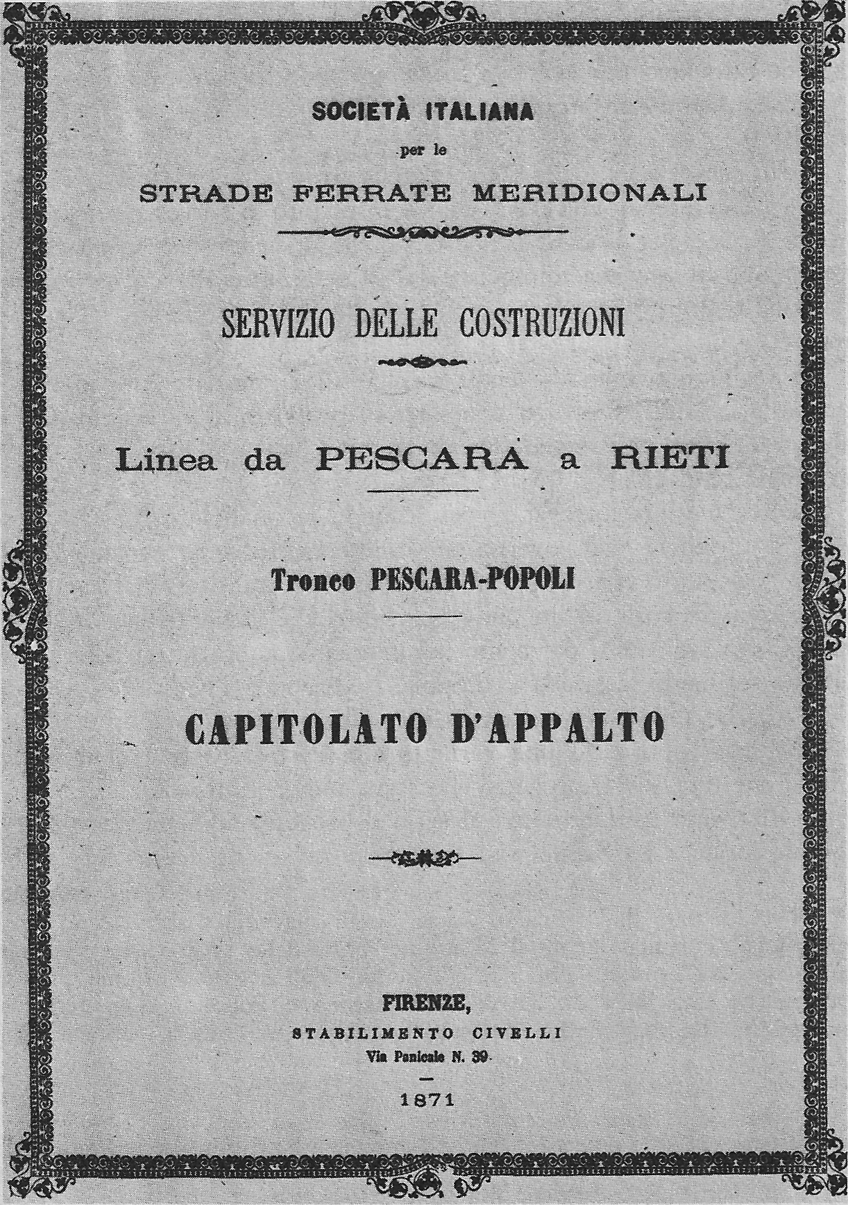 Frontespizio del capitolato d'appalto datato 1871 per i lavori di costruzione del primo tronco (Pescara-Popoli) della linea Pescara-Sulmona-L'Aquila-Rieti. Successivamente tale linea ha ceduto il tratto Pescara-Sulmona alla Roma-Sulmona-Pescara.